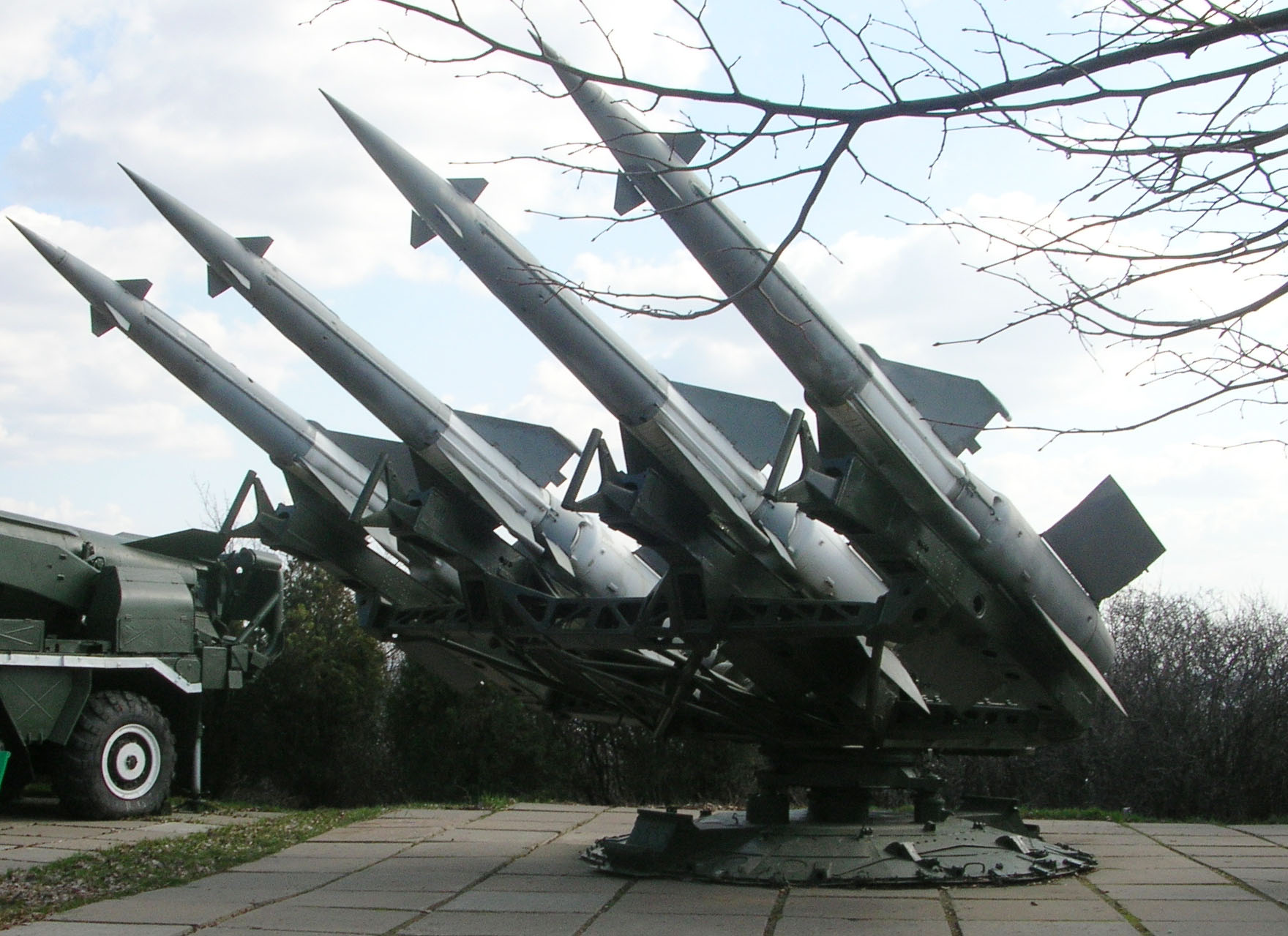 Парк Победы, г. Саратов.